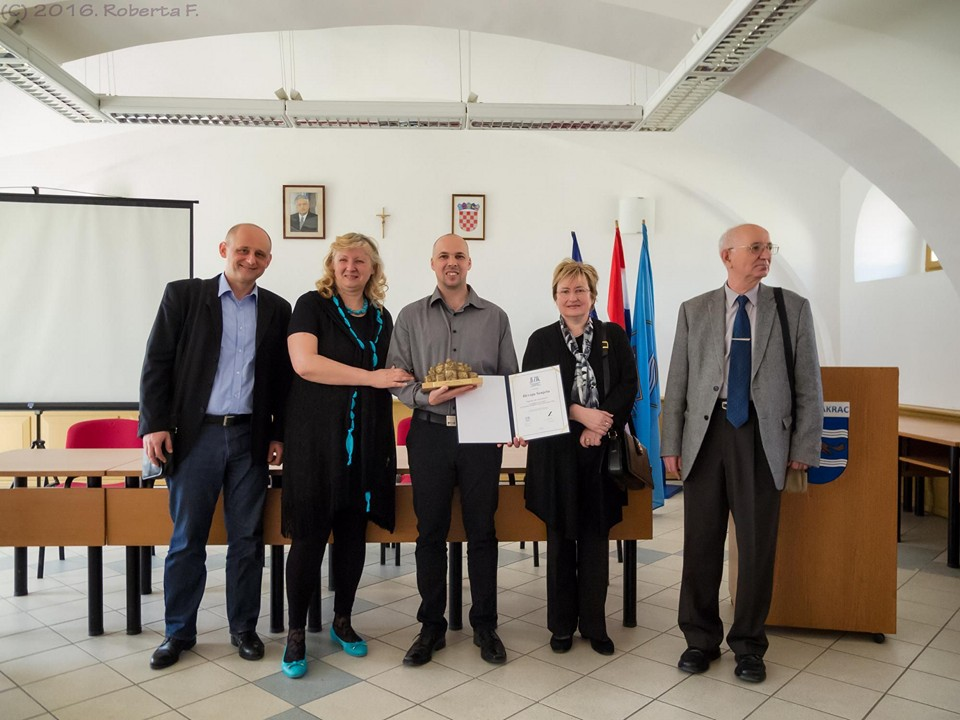 Dodjela nagrade Dr. Ivan Šreter u Pakracu